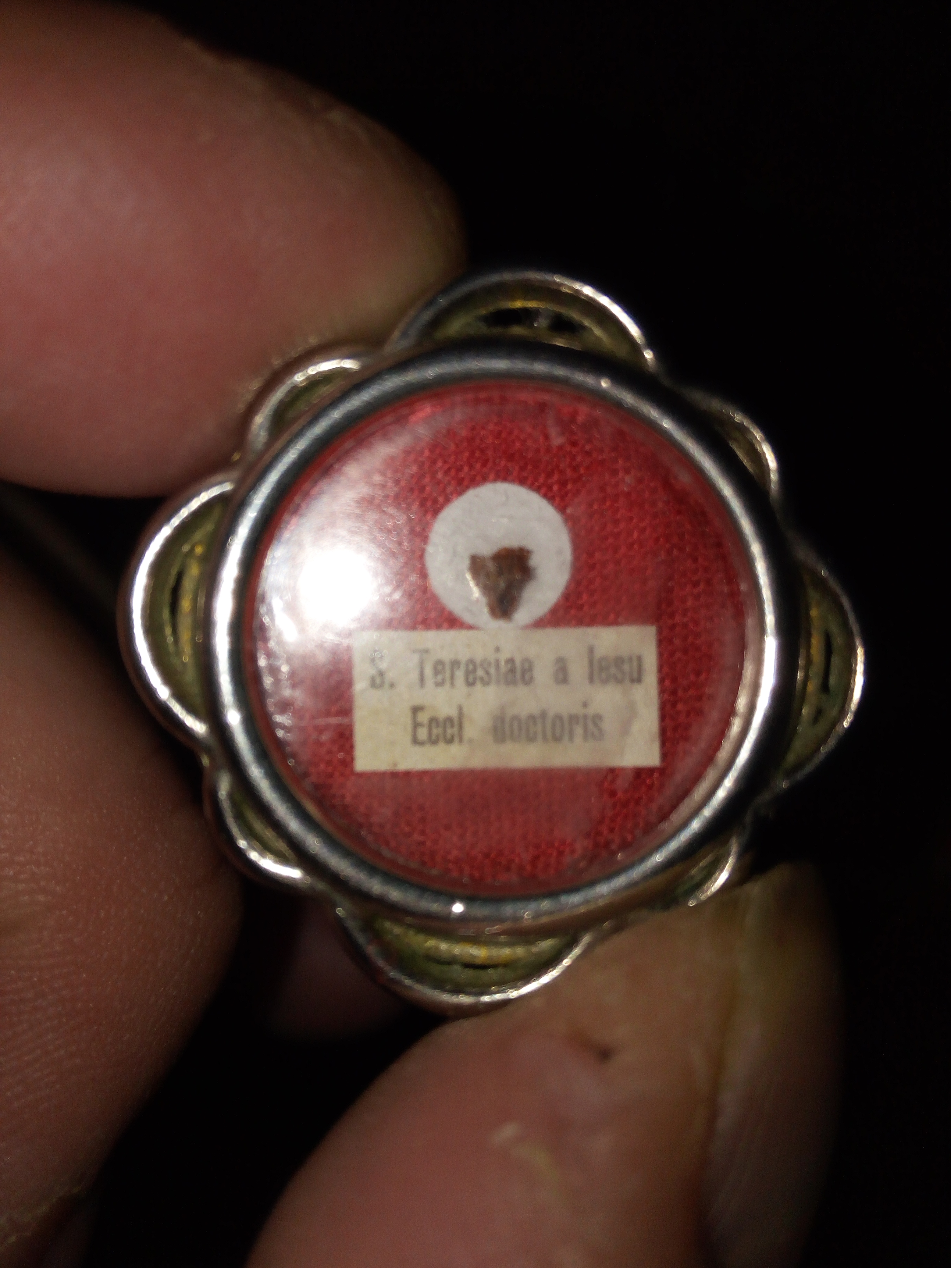 Reliquiario contenente frammento ex pulvere corporis di Sancta Theresiae a Iesu - Ecclesiae Doctoris (prov. Postulazione Ordine Carmelitano)